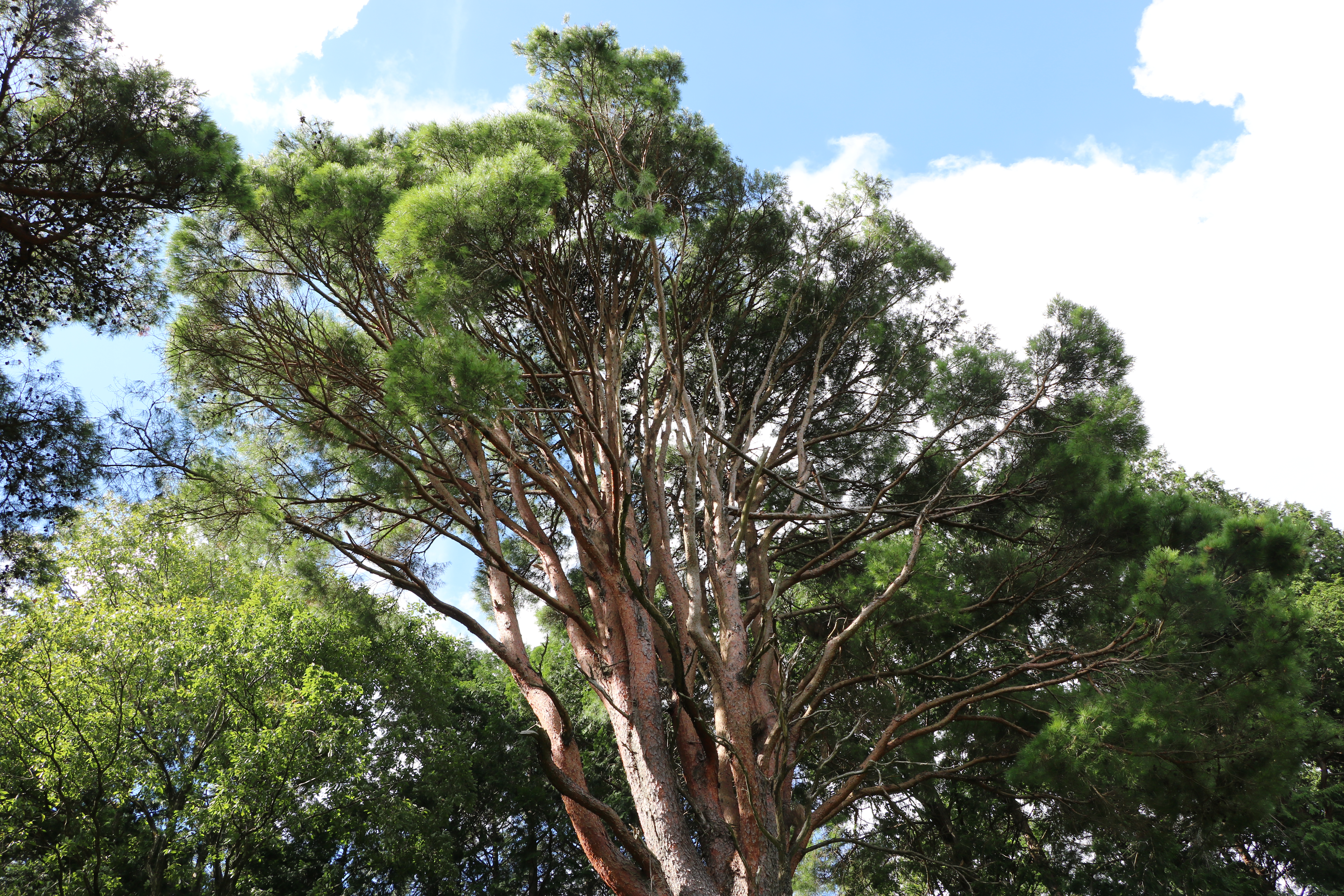 平松のウツクシマツ自生地（国指定天然記念物、滋賀県湖南市）